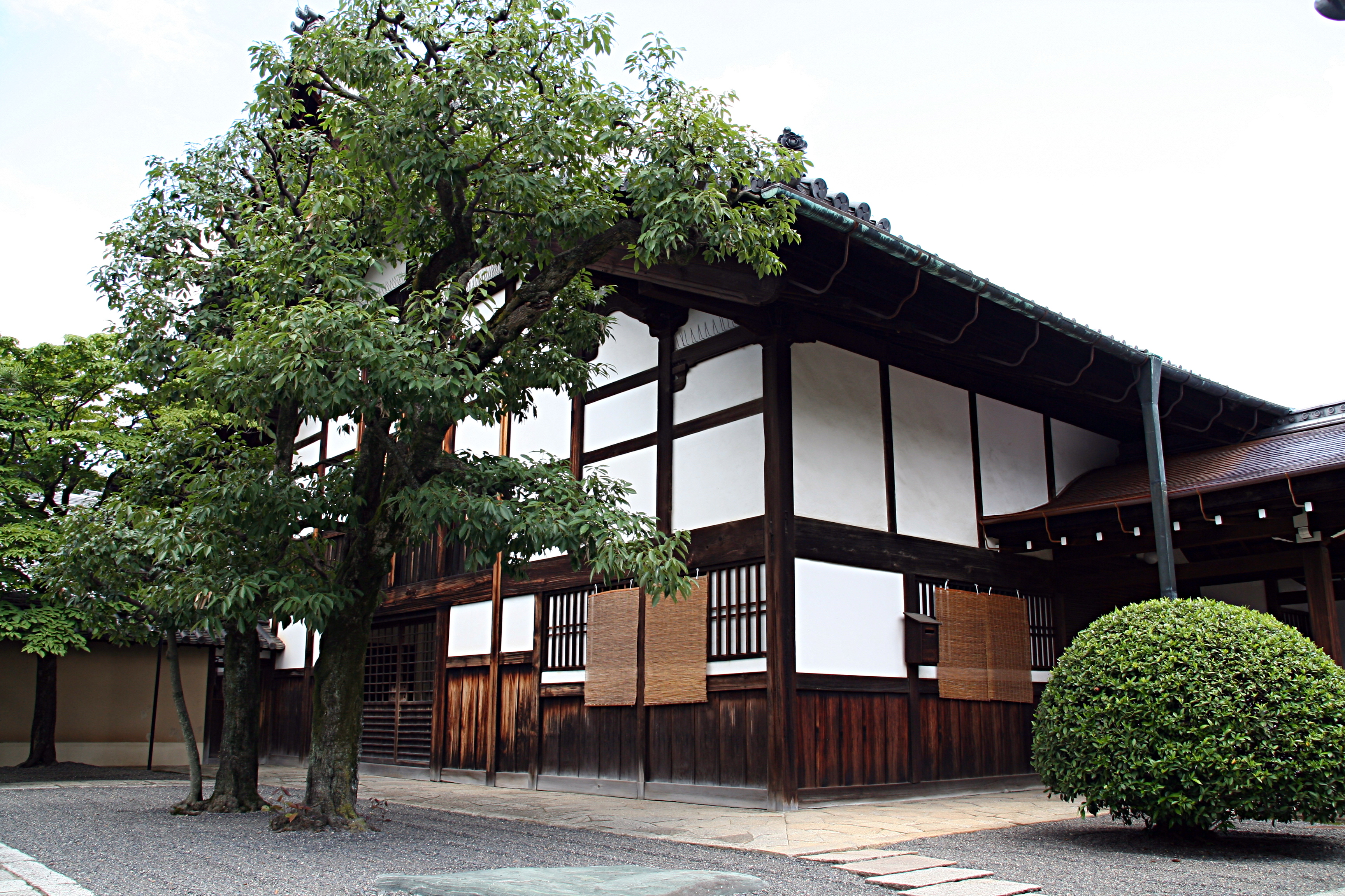 Japan, Kyôto, Daitoku-ji